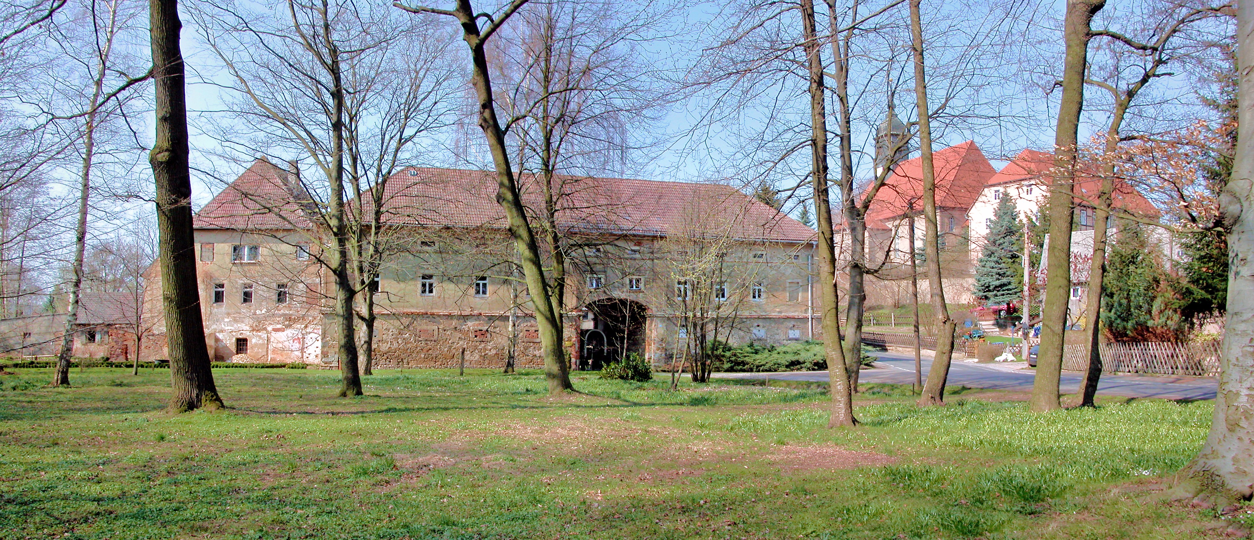 06.04.2010 04749 Kiebitz (Ostrau): Rittergut, mittig das Torhaus von Osten. Links das Herrenhaus, rechts die Kirche. [DSCN40759-40760.TIF]20100406045MDR.JPG(c)Blobelt